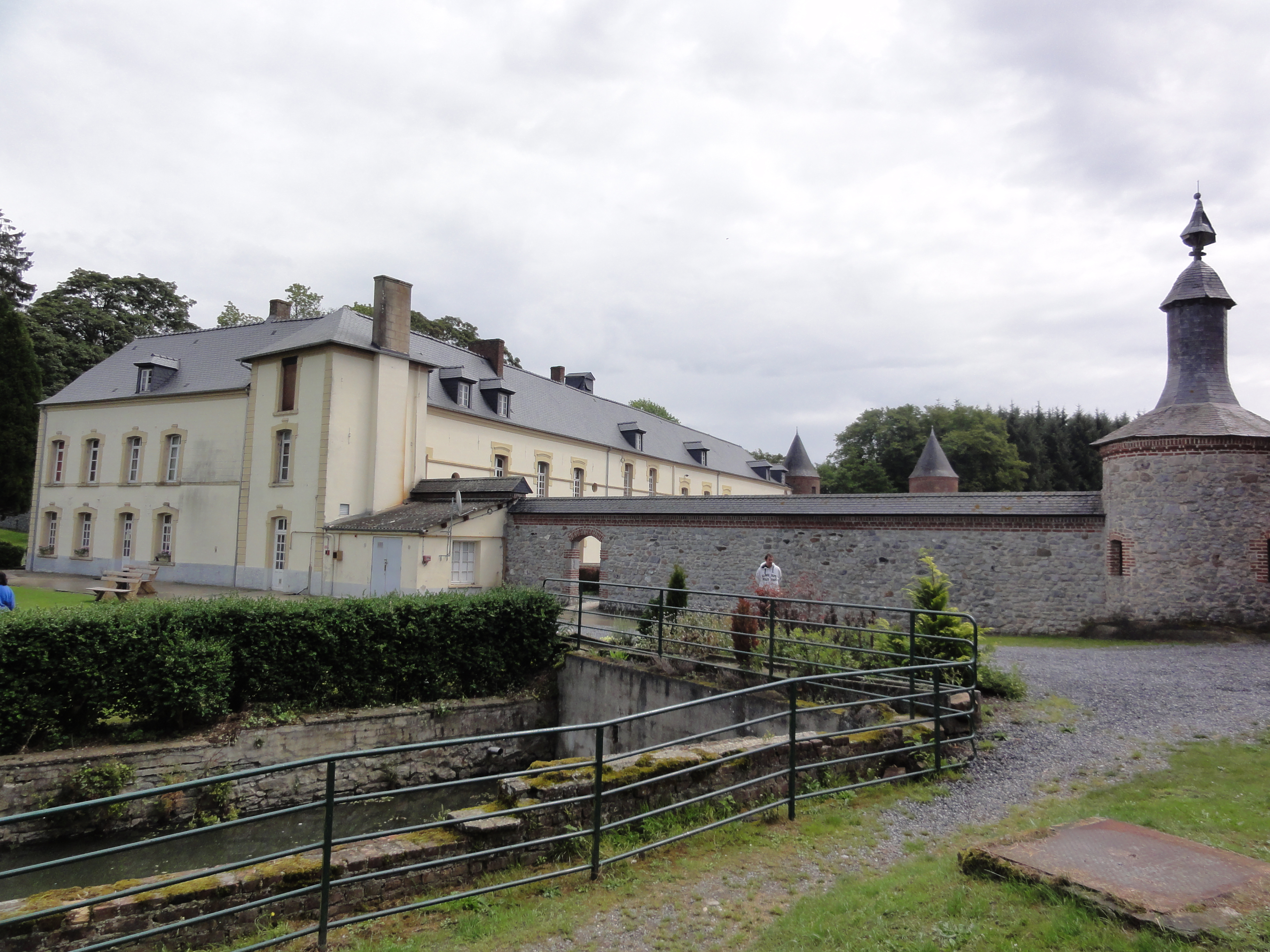 Féron (Nord, Fr) ferme-château de Pont-de-Sains